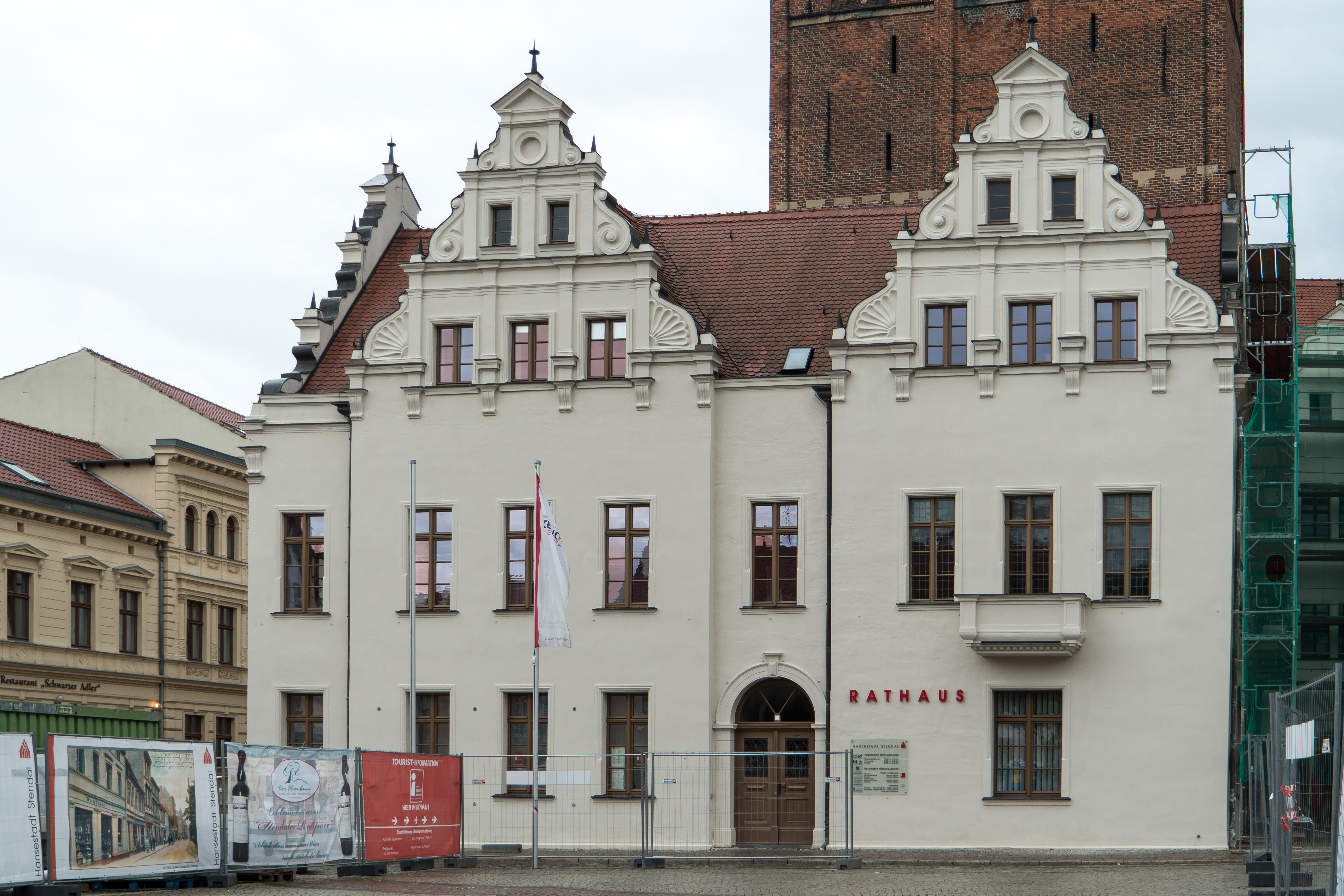 Rathaus Stendal